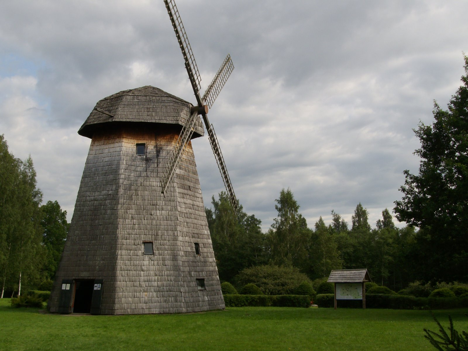 Pranglist pärit Hollandi tüüpi tuuleveski Põlva talurahvamuuseumis